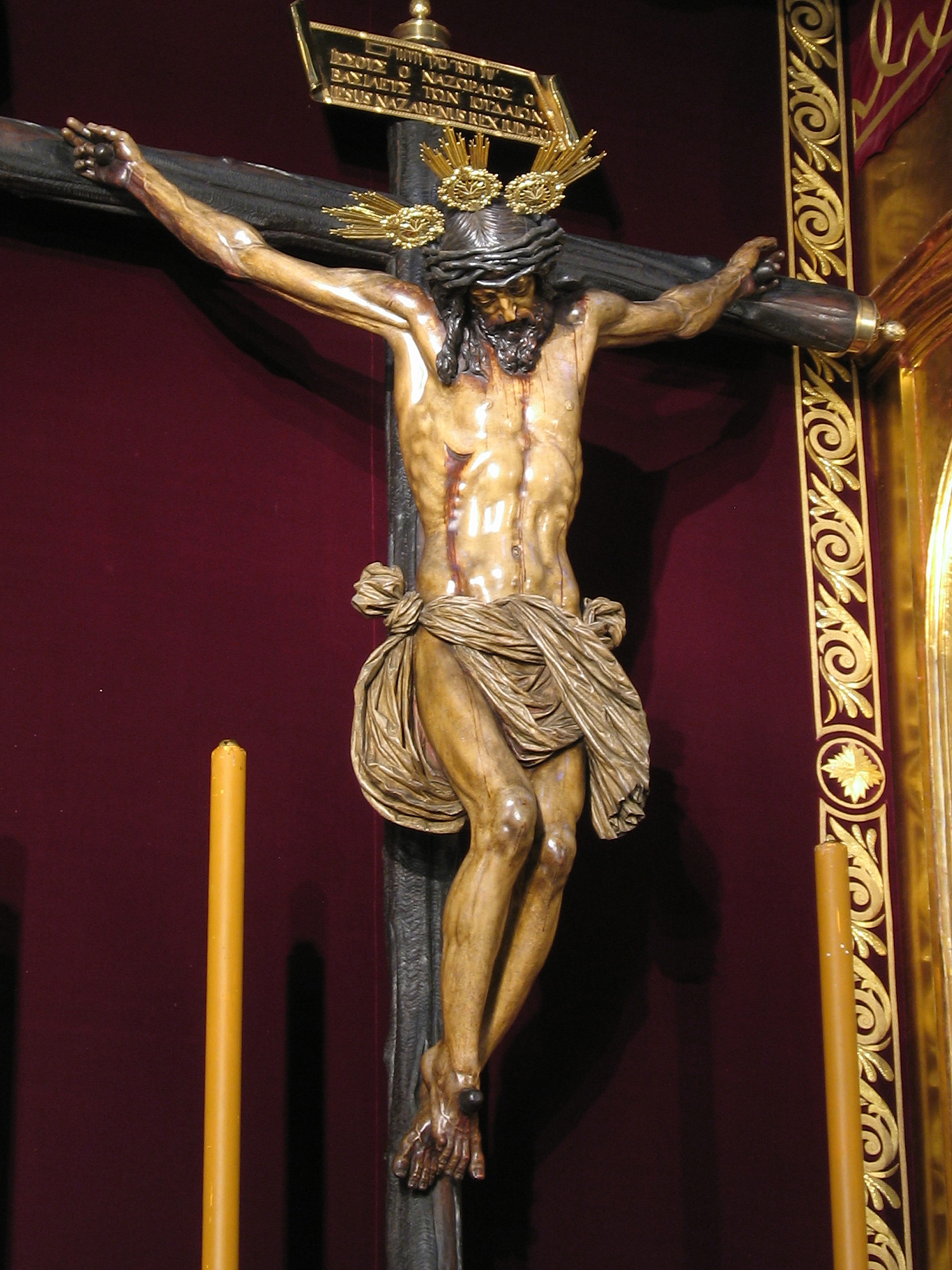 Cristo del Amor (ca. 1618 - 1620) de Juan de Mesa. Iglesia del Salvador de Sevilla